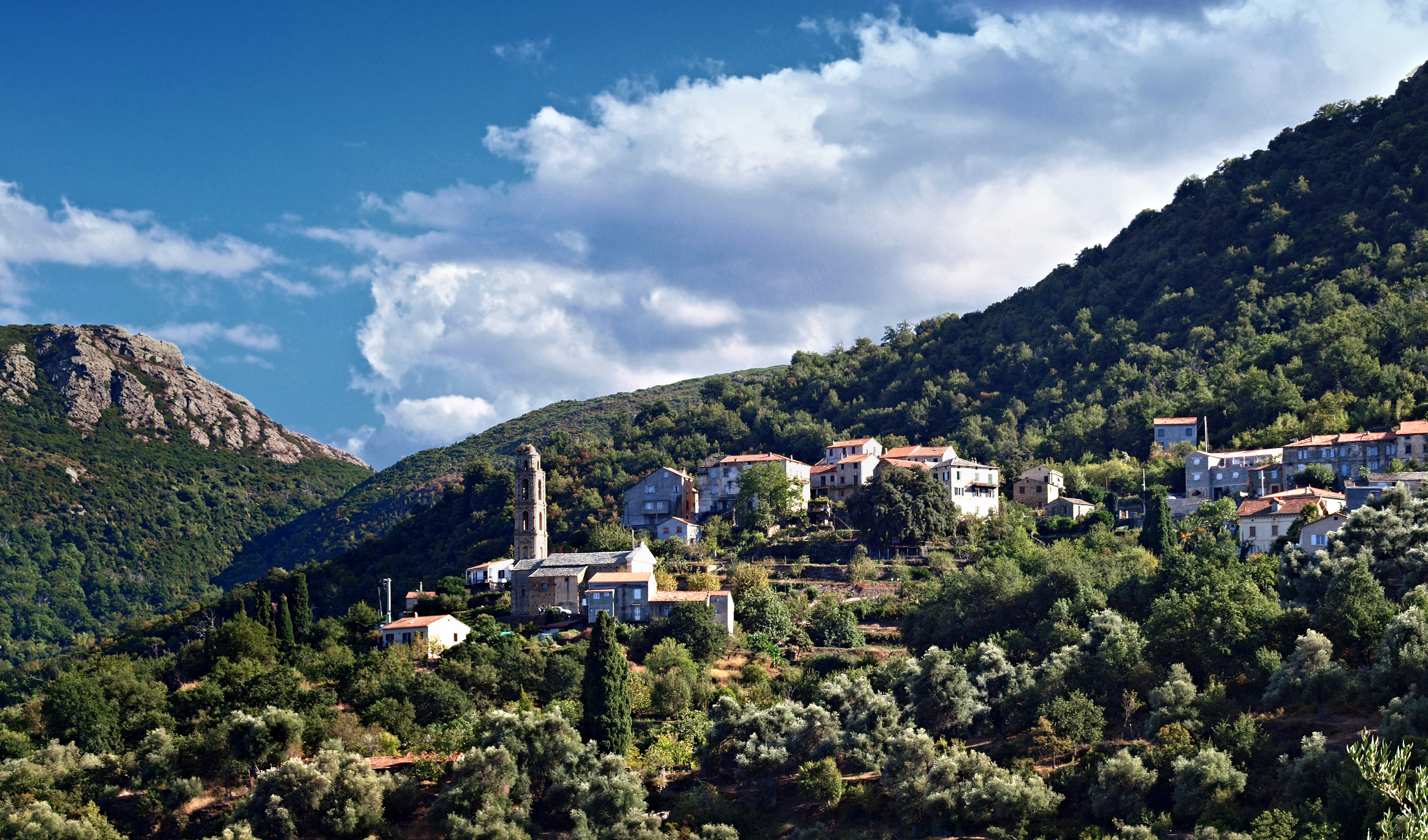 Sorio (Corsica) - Vue du village